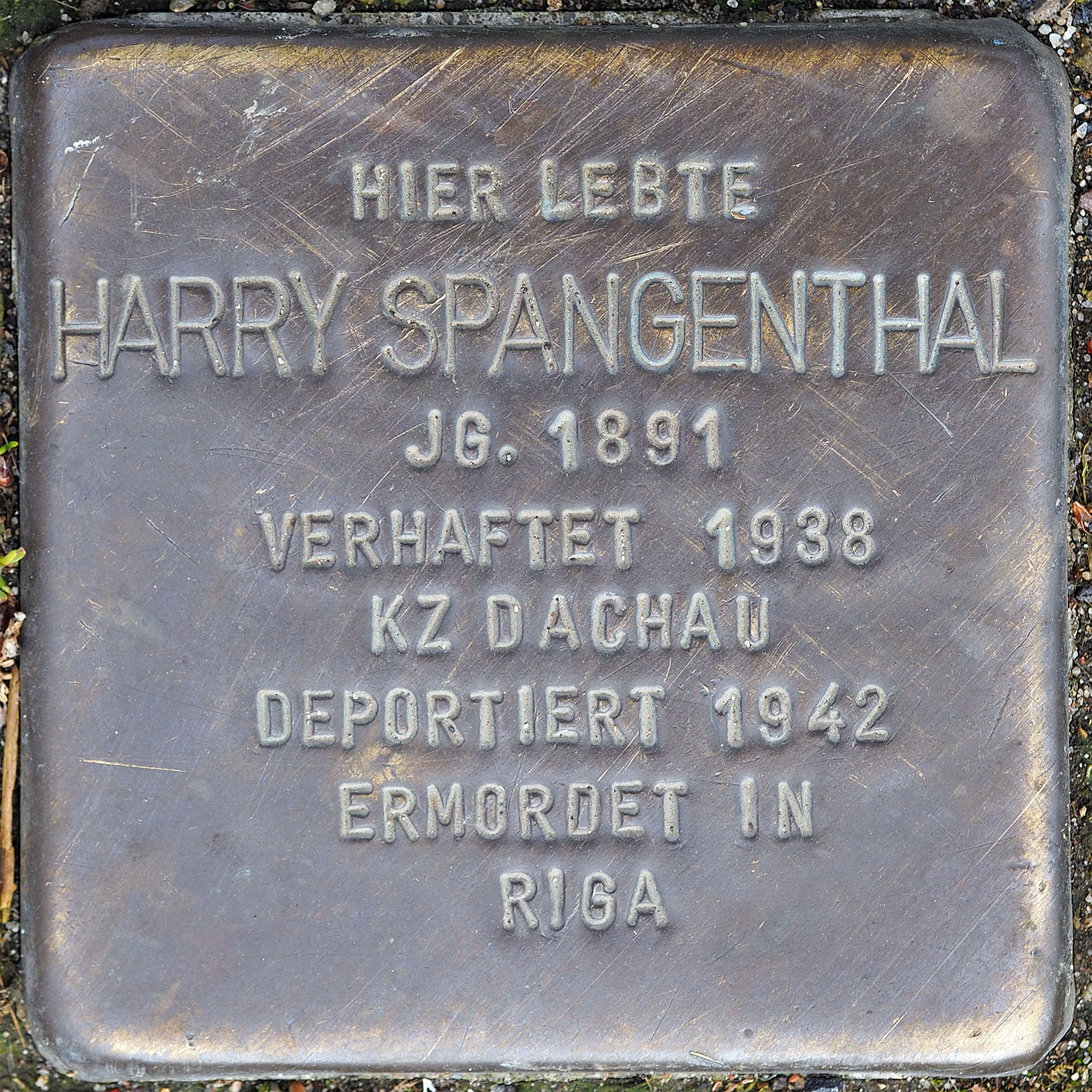 Stolpersteine MG: Spangenthal, Harry